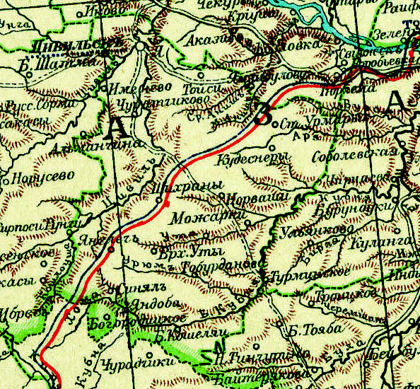 Карта Цивильского уезда из «Настольного атласа А. Ф. Маркса, 1903 года» (112 Кб)